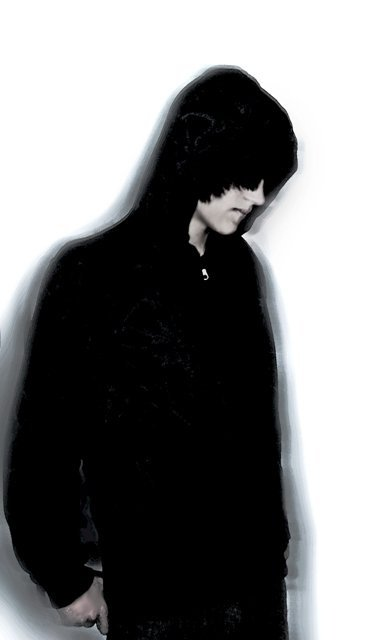 Emo Boys Czech Republic